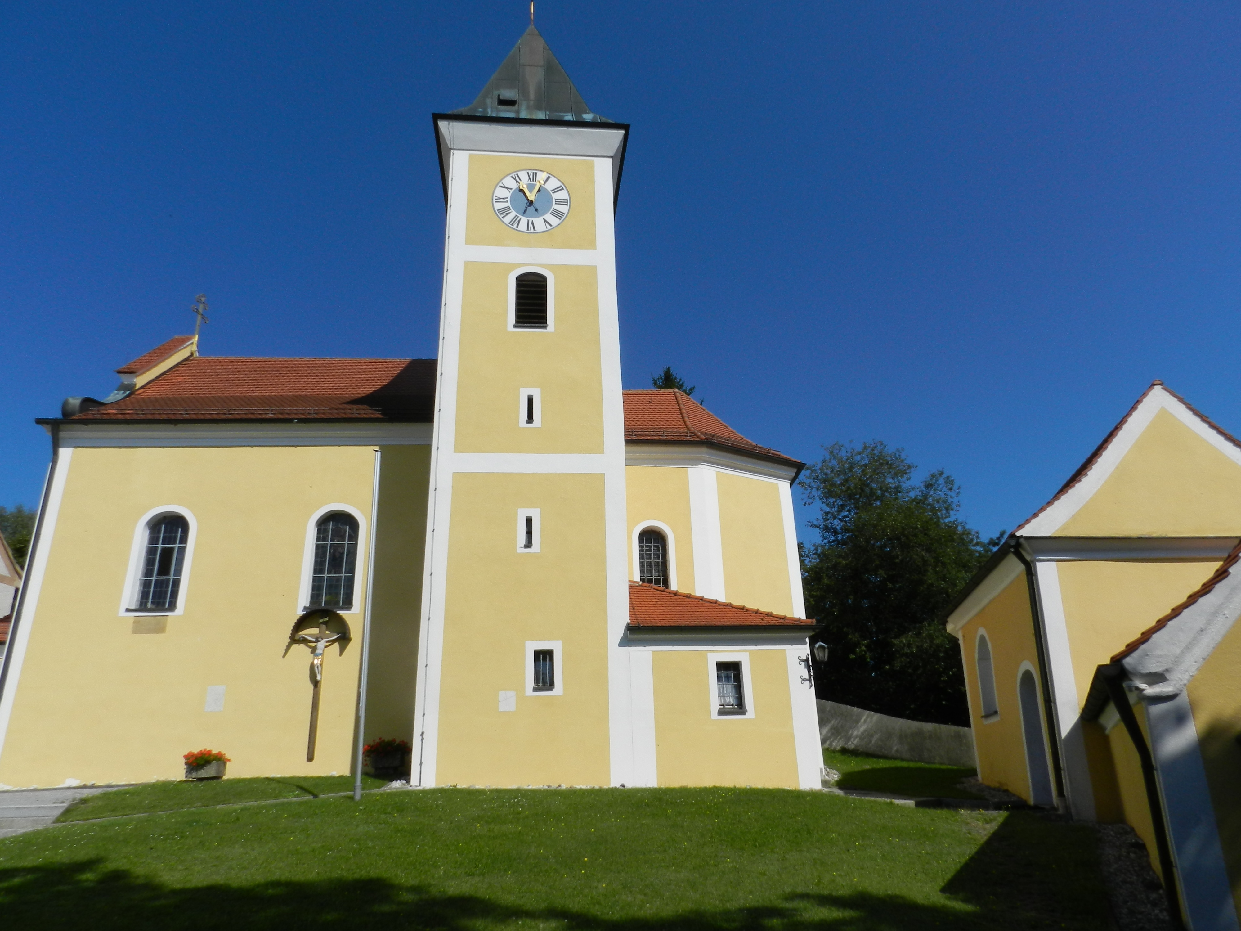 Schwarzach bei Nabburg, Pfarrkirche St. Ulrich (Landkreis Schwandorf, Oberpfalz, Bayern) (2011)